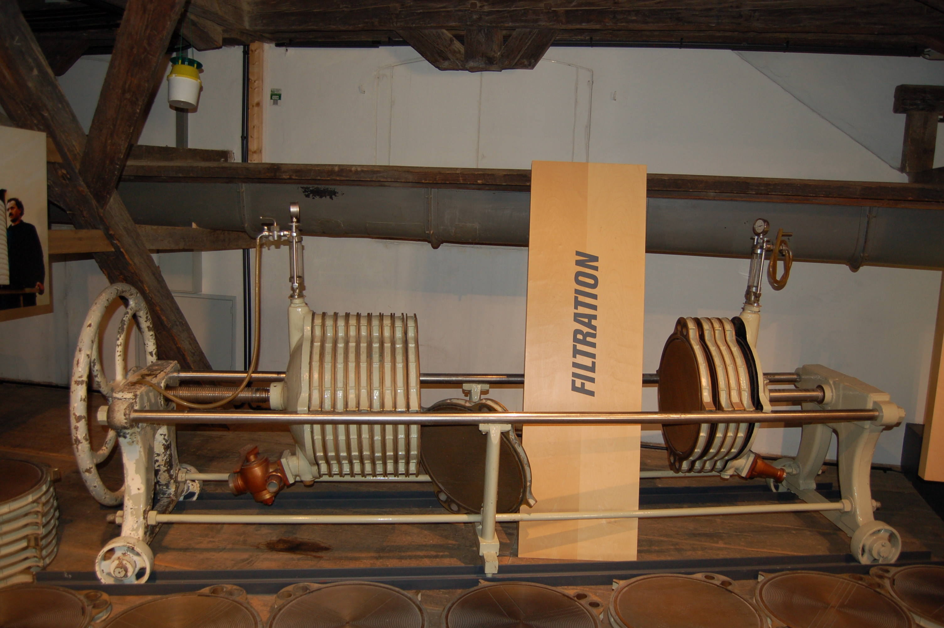 Die Stiegl-Brauwelt ist das Brauereimuseum der Stieglbrauerei zu Salzburg.